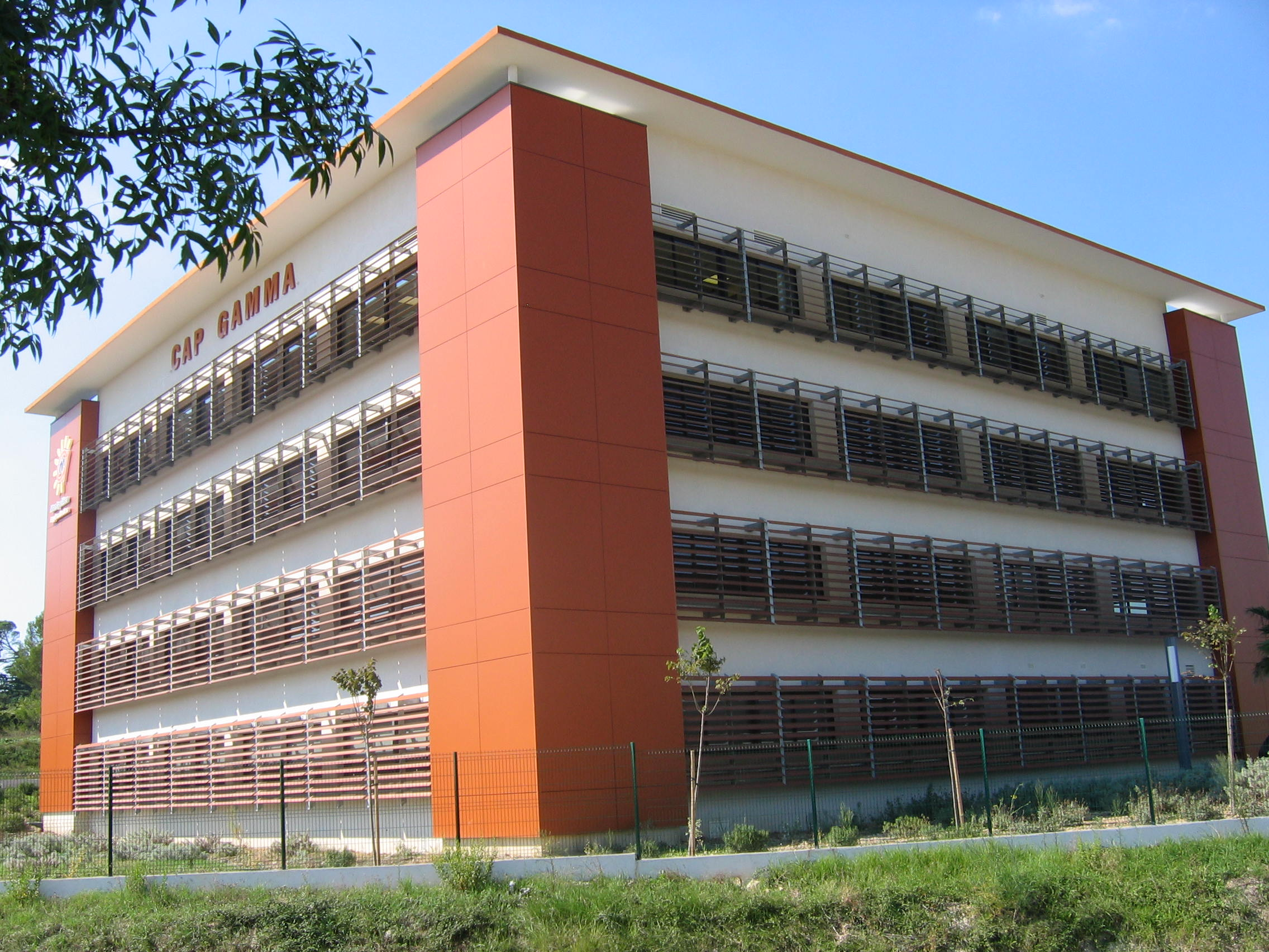 La photographie est placée sous licence Cretive Commons CC-BY-SA-2.5 L'autorisation de reproduire l'image n'affecte en rien les éventuels droits à l'image des architectes : Gilles Chrétien et Jean-Luc Martineau. Cette photographie a vocation à illustrer l'action de la Communauté d'agglomération Montpellier Agglomération dansle domaine du développement économique. Il n'est pas certain qu'elle puisse être réutilisée dans un autre contexte. Montpellier, Hérault, FRANCE